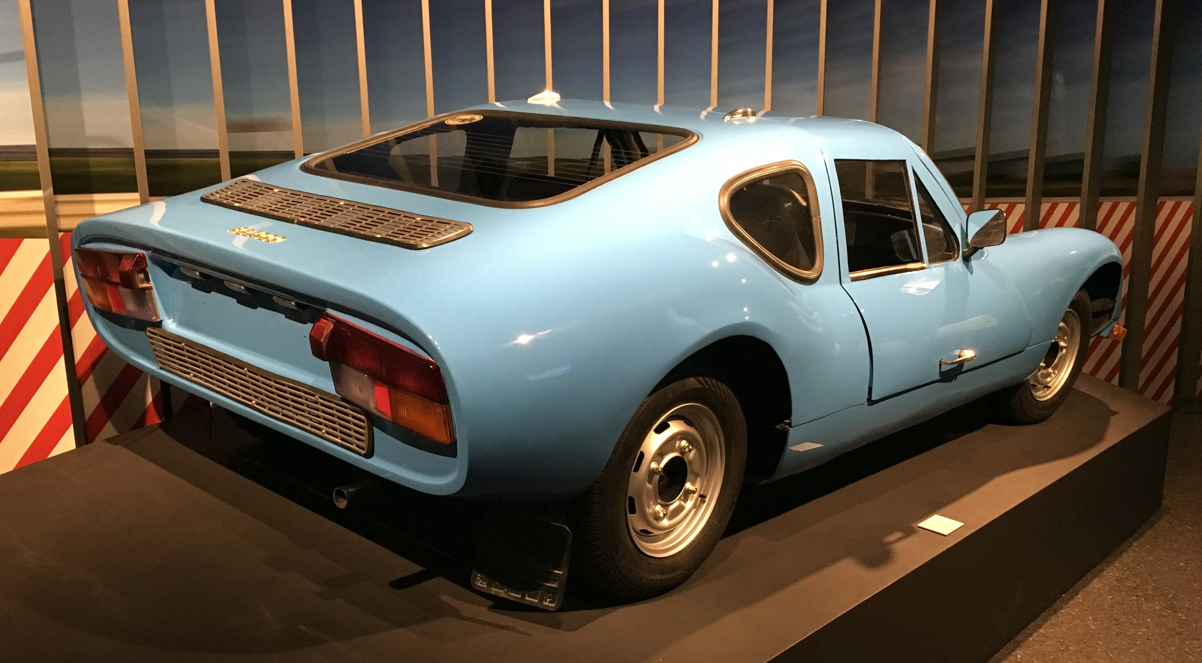 Bonn, Haus der Geschichte (Museumsmeile, Willy-Brandt-Allee 14, 53113 Bonn), Exponat der Wechselausstellung "GELIEBT. GEBRAUCHT. GEHASST. Die Deutschen und ihre Autos" (10.03.2017–21.01.2018): Melkus RS 1000 (DDR-Sportwagen aus nicht-staatlicher Kleinserienfertigung/technische Basis: Wartburg 353).